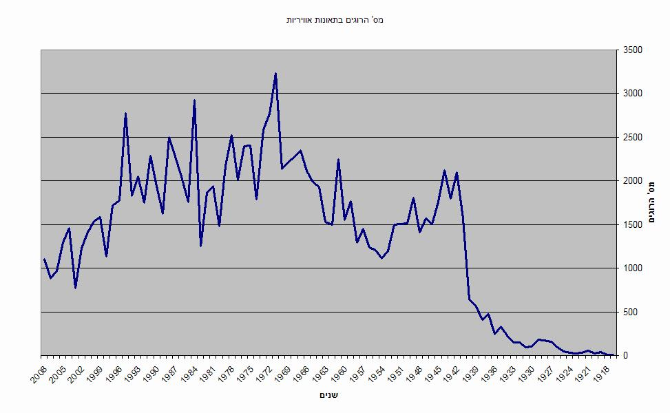 סטטיסטיקה של מס' הרוגים בתאונות אוויריות